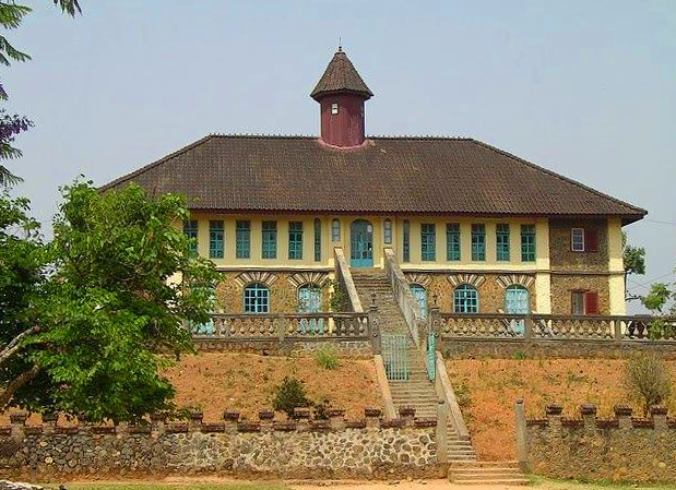 Musée de Bafut, Nord-Ouest